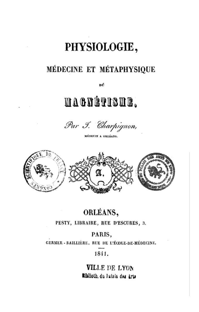 Português do Brasil: Physiologie, médecine et métaphysique du magnétisme